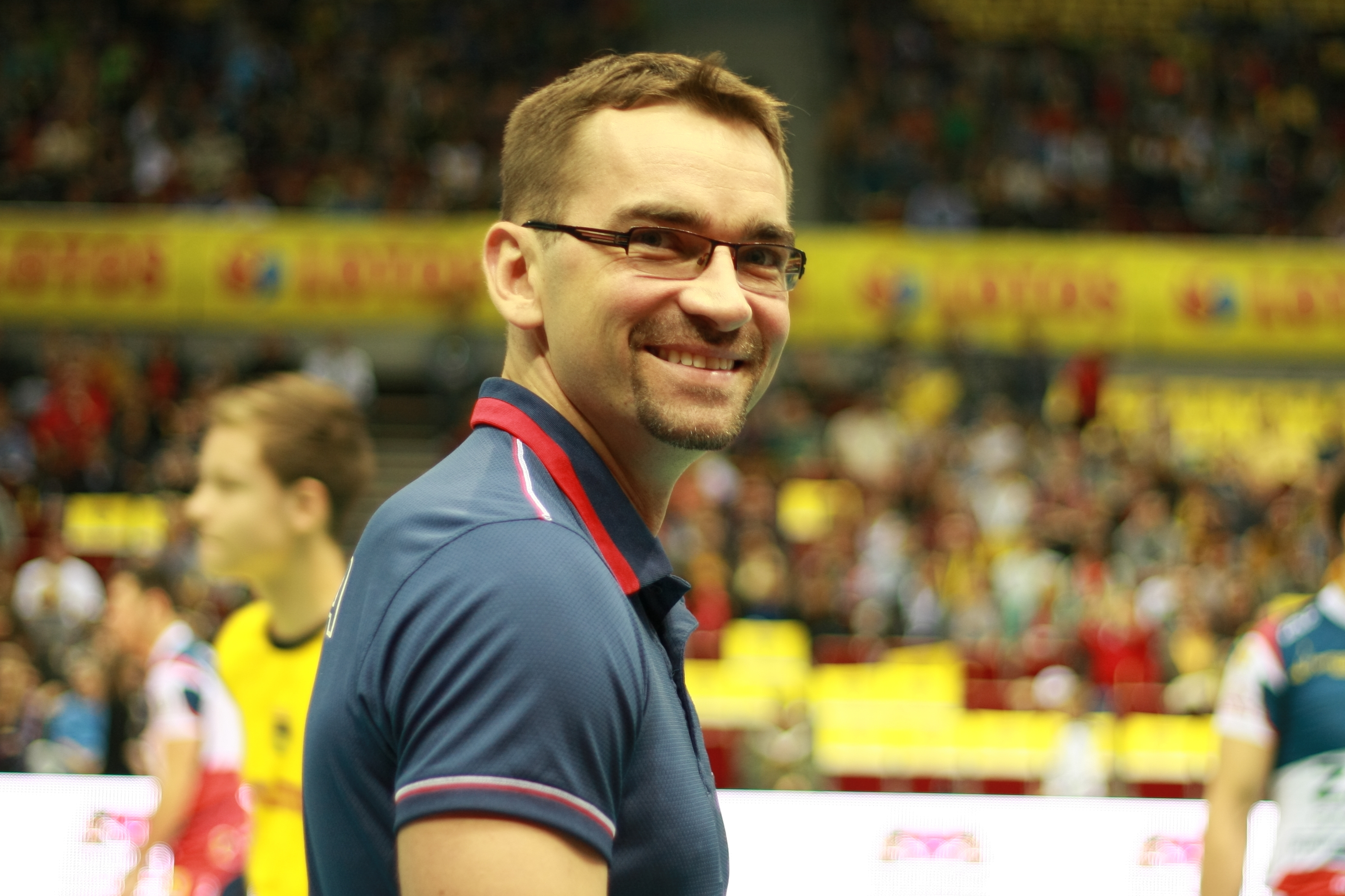 Sebastan Świderski